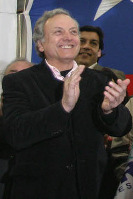 Eduardo Frei en Isla de Maipo